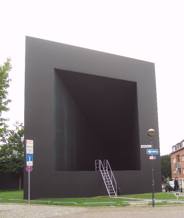 Gregor Schneider: „END“ (2009) vor dem Museum Abteiberg in Mönchengladbach